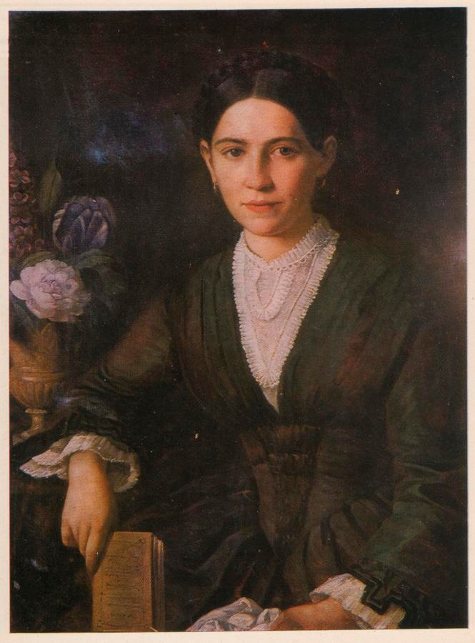 Павло Іванович Шлейфер. Портрет дружини, 1853. Pavlo Ivanovych Schleifer. The portrait of his wife, 1853. Paul Johann Schleifer. Das Porträt seiner Frau, 1853.